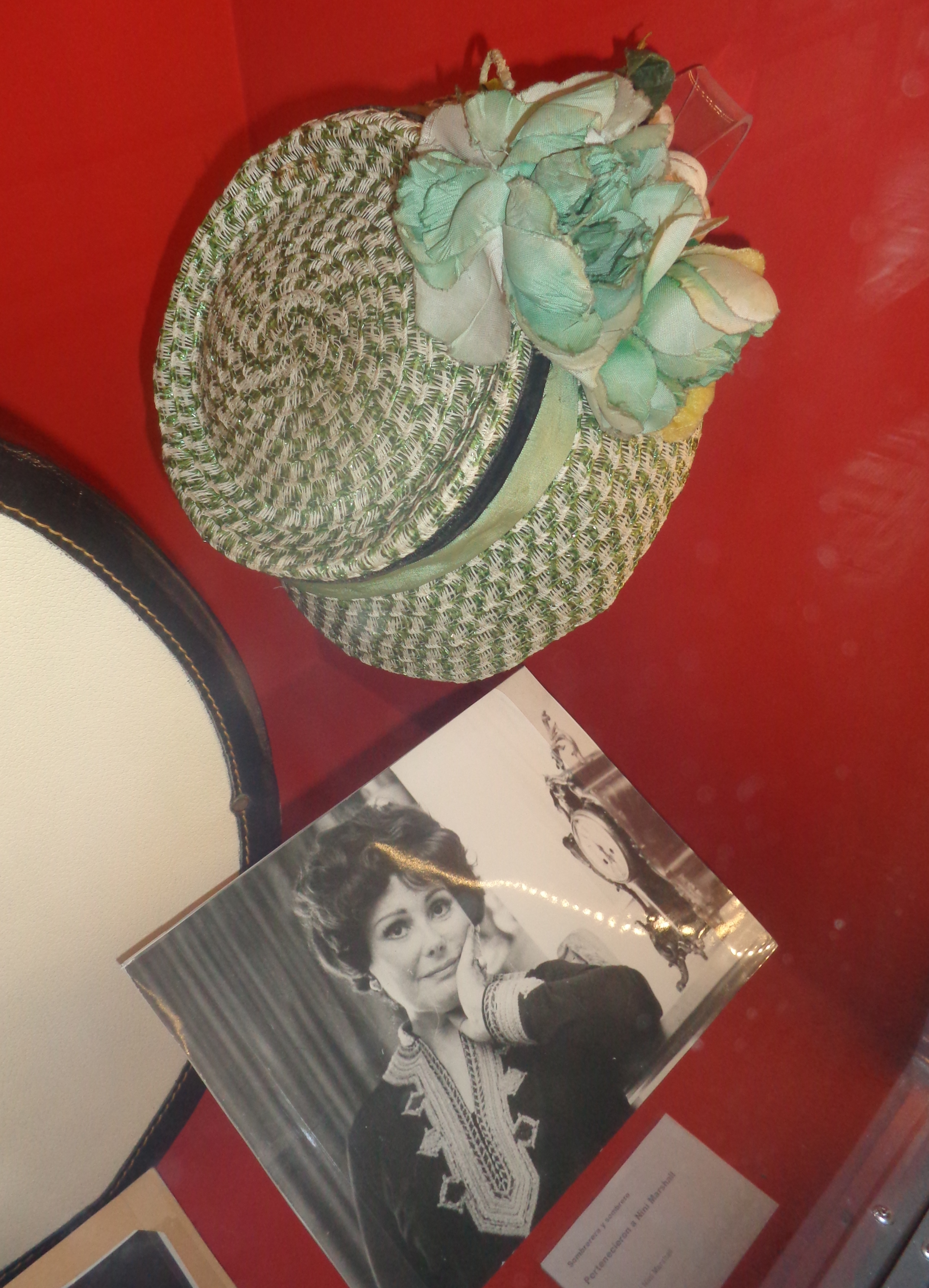 Sombrero utilizado por Niní Marshall que se encuentra en el museo Museo del Cine Pablo Ducrós Hicken, en el barrio de la Boca, Buenos Aires, Argentina.